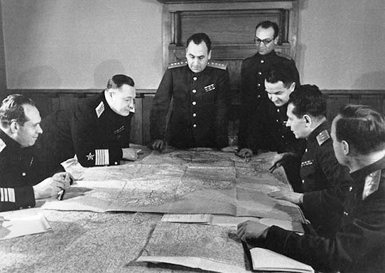 Военные советники СССР на Ялтинской конференции 1945 г. В центре – генерал армии Алексей Иннокентьевич Антонов (1896 — 1962)